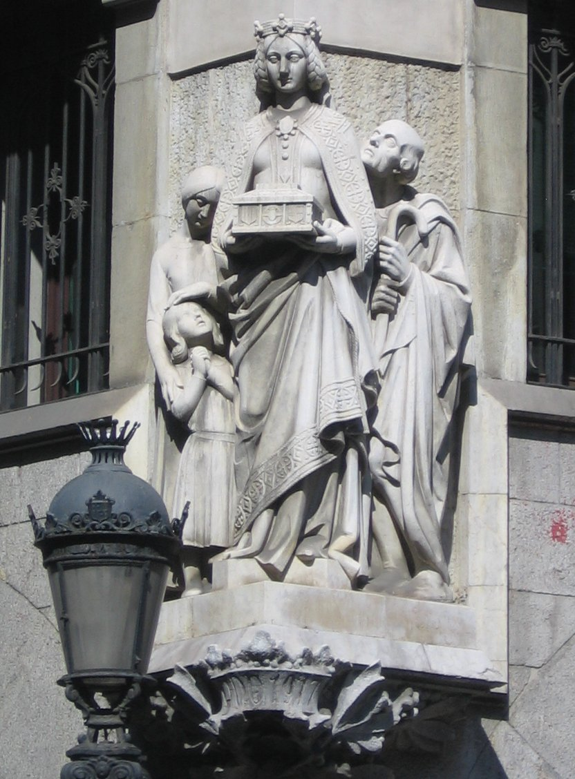 Ahorro, de Manuel Fuxà, Caixa de Pensions i d'Estalvis de Barcelona (Vía Layetana).